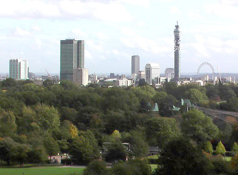 Primrose Hill. Udsyn over London. 2004